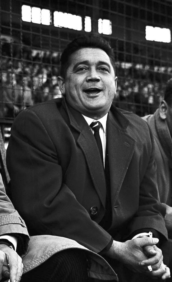 16 octobre 1960. plan 3/4 sur les deux anciens joueurs de rugby à XIII Vincent Cantoni et Puig Aubert (vue de face), sont assis en bordure de terrain et regardent le match ; en arrière plan gradins avec spectateurs.